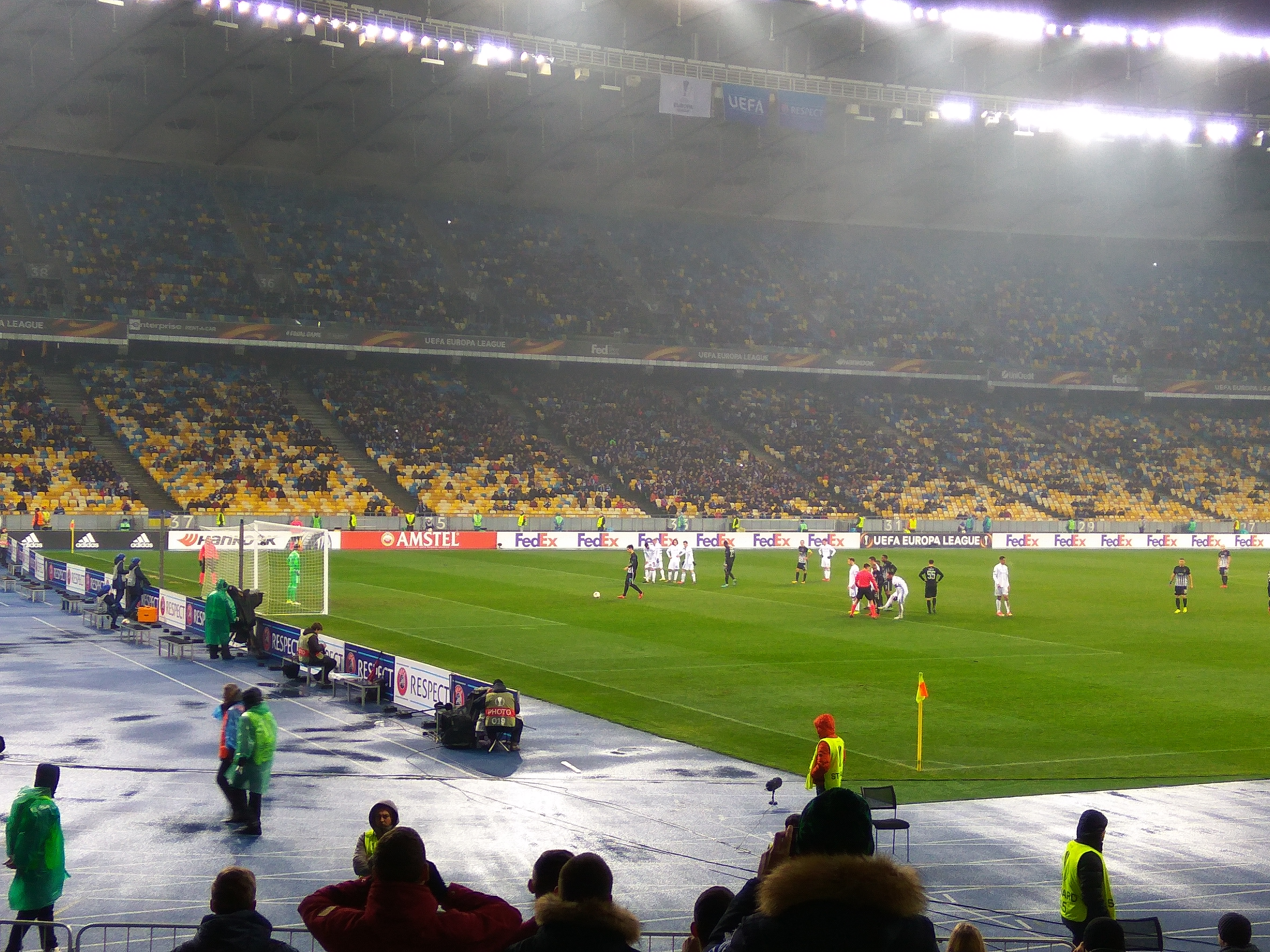 Ліга Європи УЄФА. 07.12.2017 р. Динамо (Київ) - Партизан 4:1